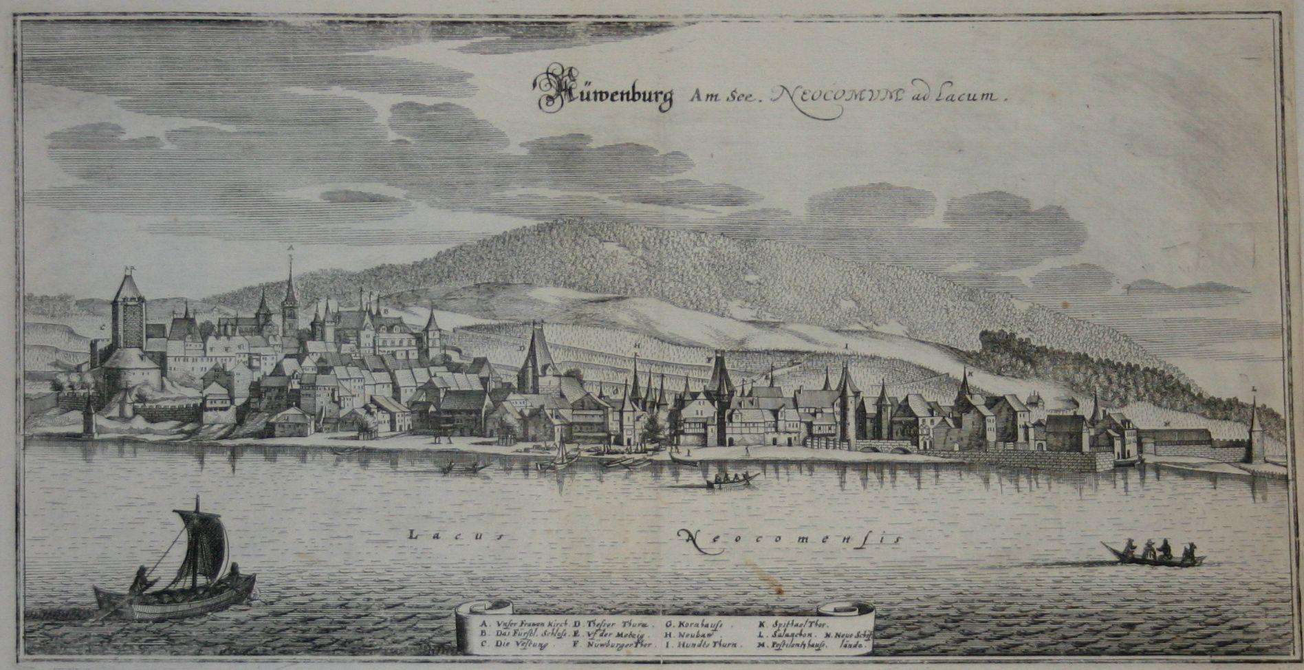 Vue de Neuchâtel depuis la Lac par Mérian